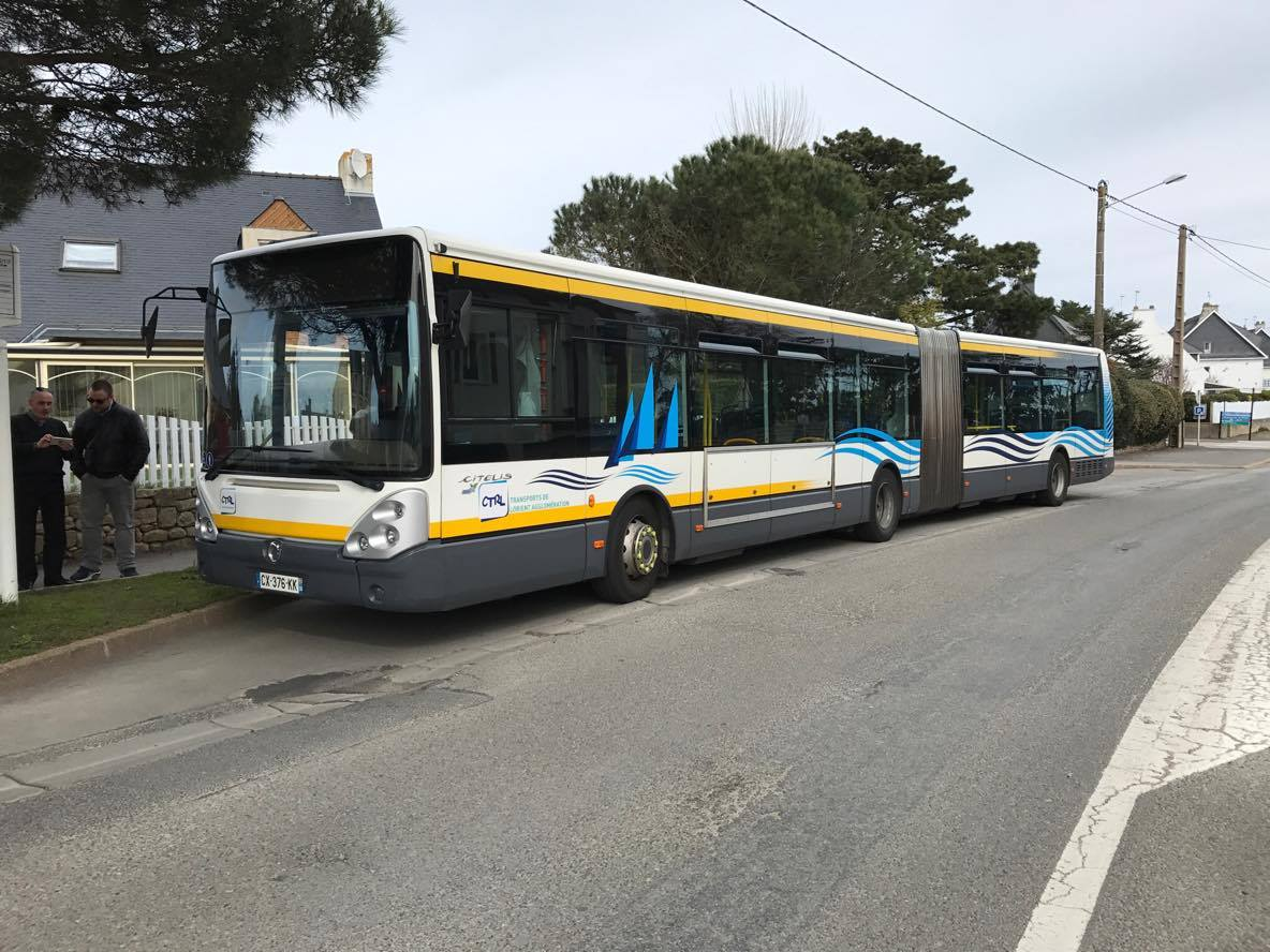 Irisbus Citélis 18 du réseau CTRL de Lorient.